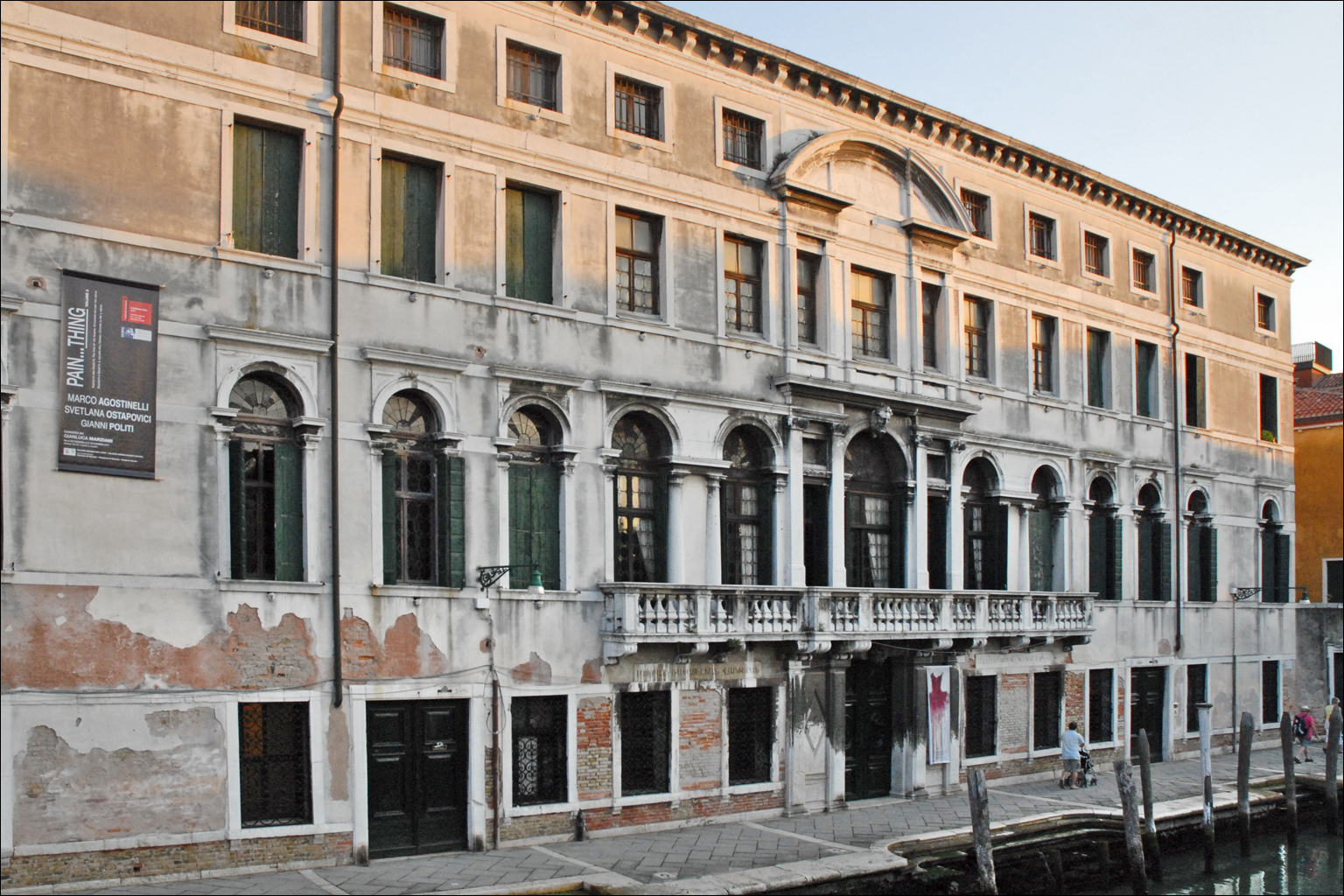 La façade extérieure du palais Zenobio au crépuscule Le palais Zenobio a été érigé à la fin du XVIIème siècle sur un projet d'Antonio Gaspari, un élève de Longhena. Au XIXème siècle, le palais est devenu la propriété de la congrégation arménienne, fondée par Méchitar et dont le couvent est installé depuis 1717 sur l'île San Lazzaro, pour y ouvrir un collège (Moorat-Raphael) en 1836. Album sur l'île San Lazzaro Ce collège a transmis la culture et la langue arménienne à de nombreux jeunes pendant plus de 160 ans. Il a été fermé en 1997. Un projet de rénovation est en cours en vue de créer un centre culturel et un espace de séminaire. Durant la 53ème biennale en 2009, le palais Zenobio a accueilli plusieurs pavillons nationaux : Arménie, Syrie, Macédoine et des évènements particuliers . Durant la 54ème biennale en 2011, le palais Zenobio a accueilli le pavillon national de l'Arménie et le pavillon national de l'Islande ainsi que deux expositions dont celle des photographies d'Anastasia Khoroshilova appelée "Starie Novosti" (Old News) voir le panoramique de la salle de bal du palais